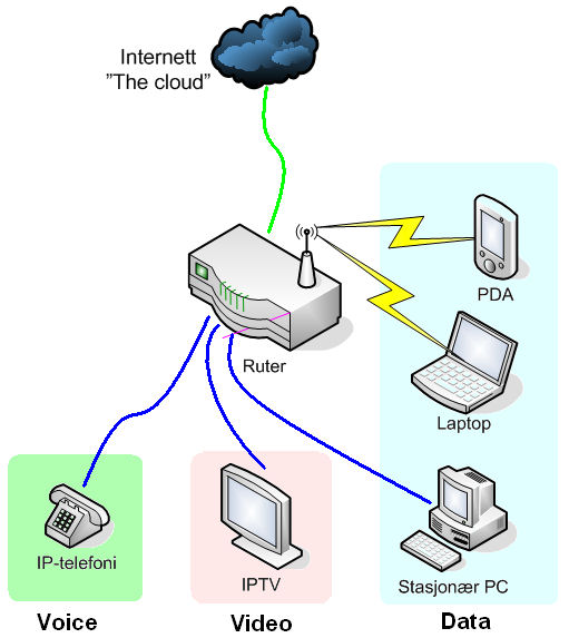 oversikt over triple play. laget i visio. overhodet ingen copyright :-)